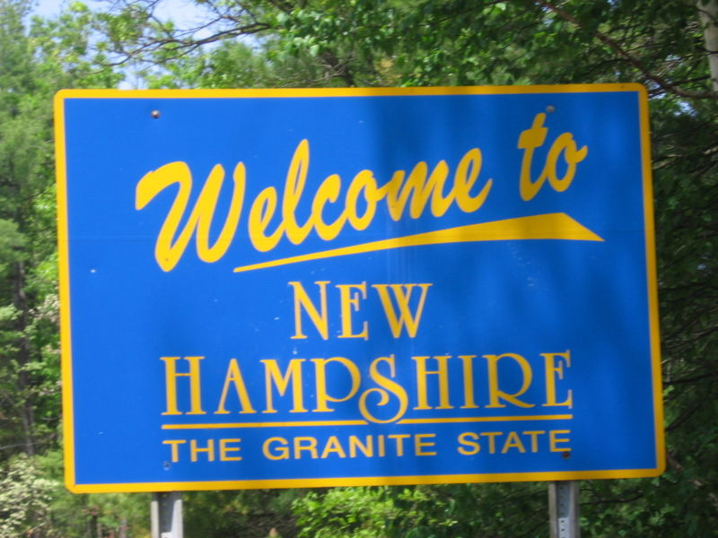 Cártel de la frontera del estado de Nueva Hampshire